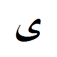 Das Alif maqsura, ein arabischer Zusatzbuchstabe, in isolierter Form.